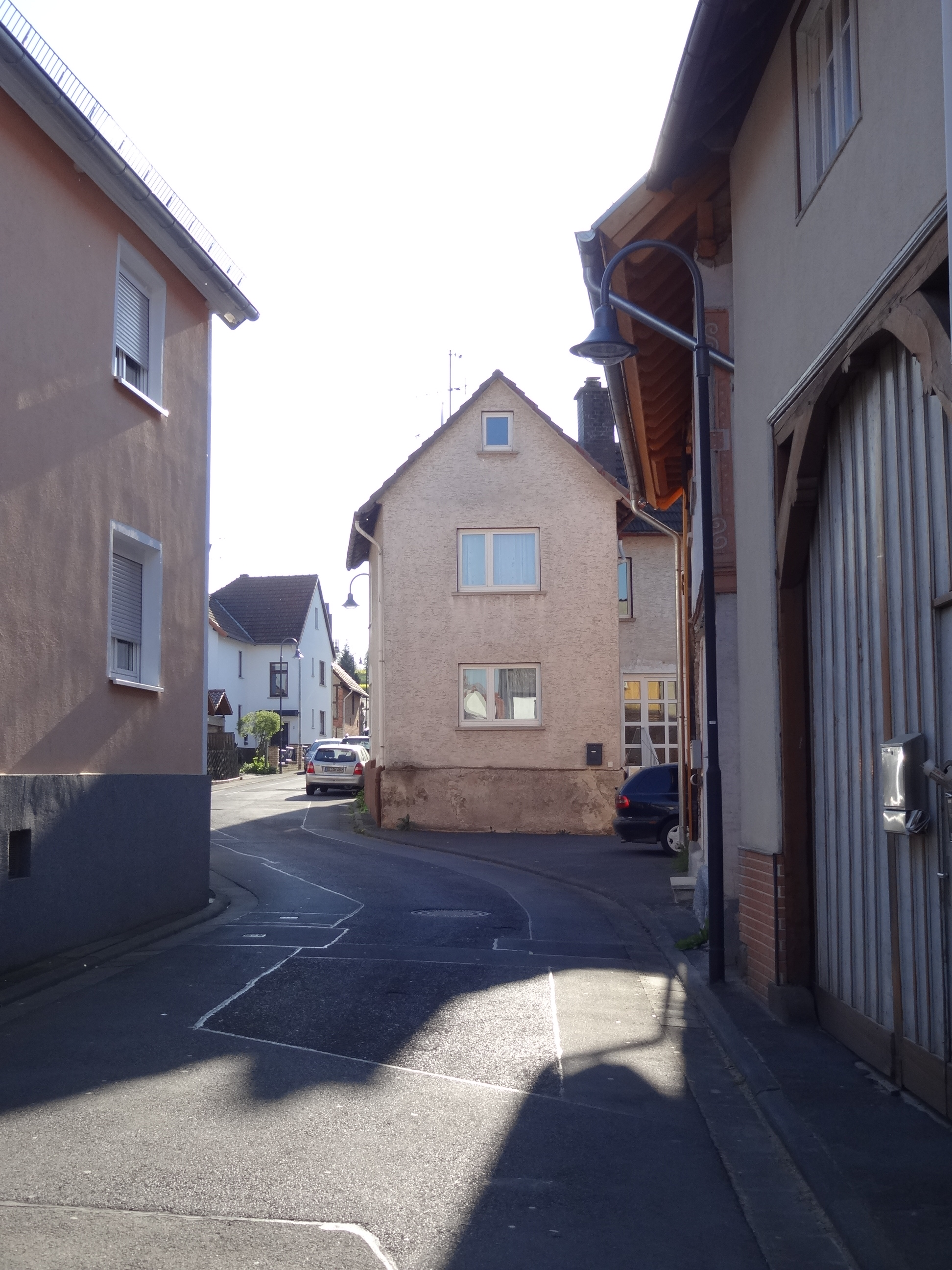 Gesamtanlage historischer Ortskern (Grüningen)